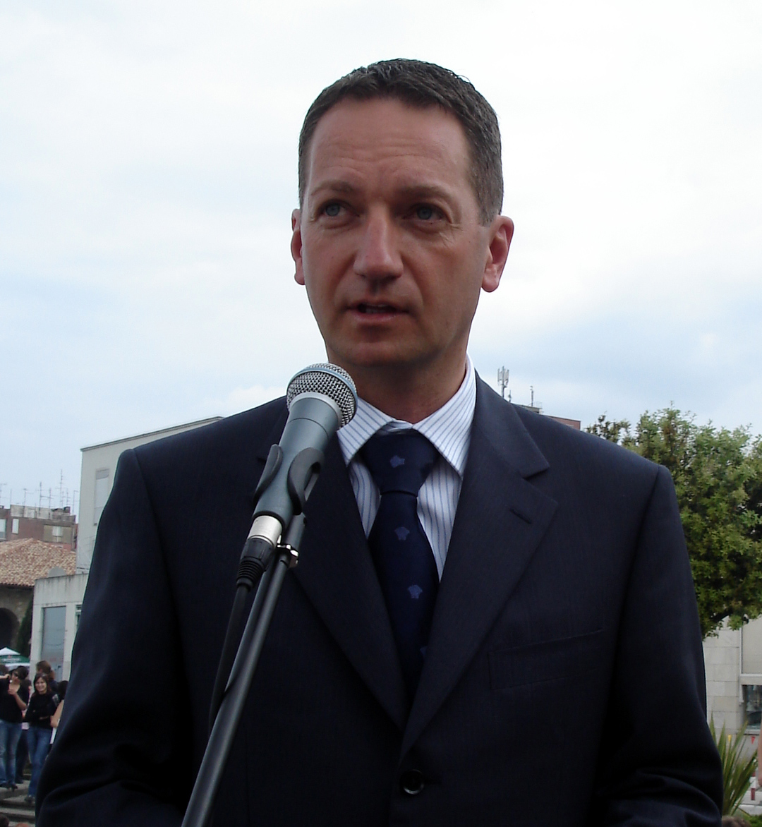 Boris_Popovič, Slovene politician, Koper 2006